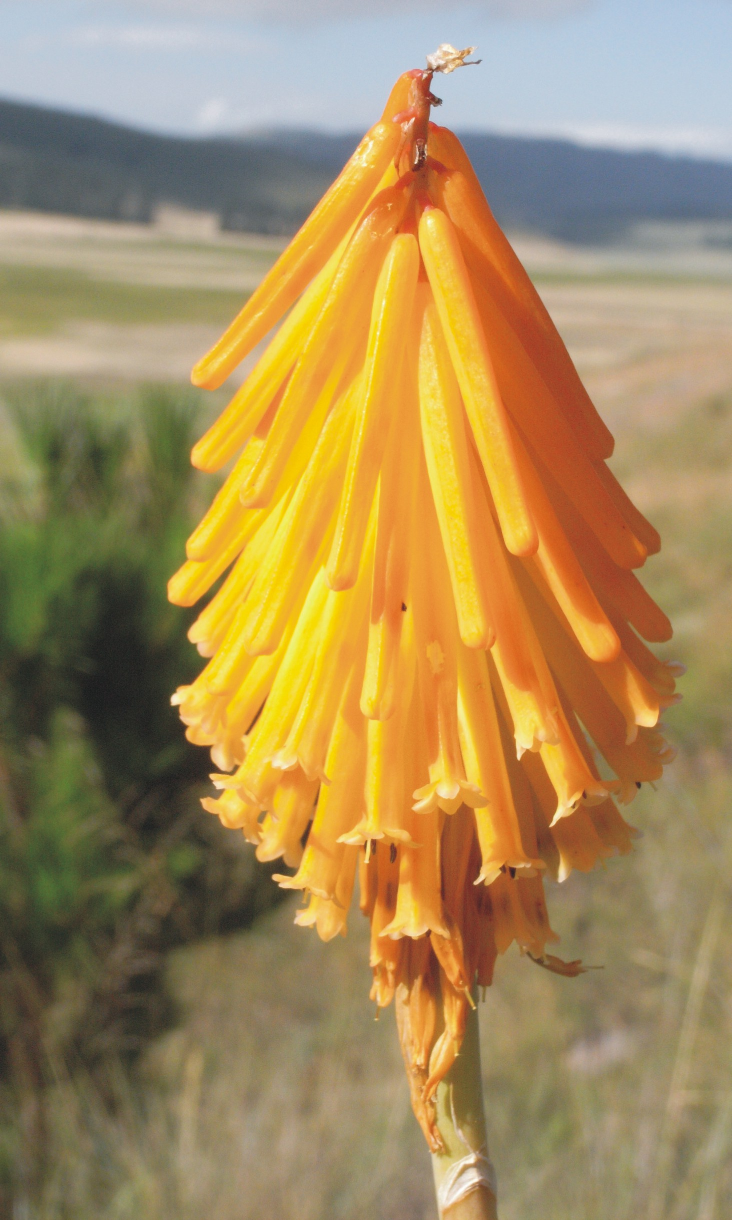 Blüte Kniphofia uvaria